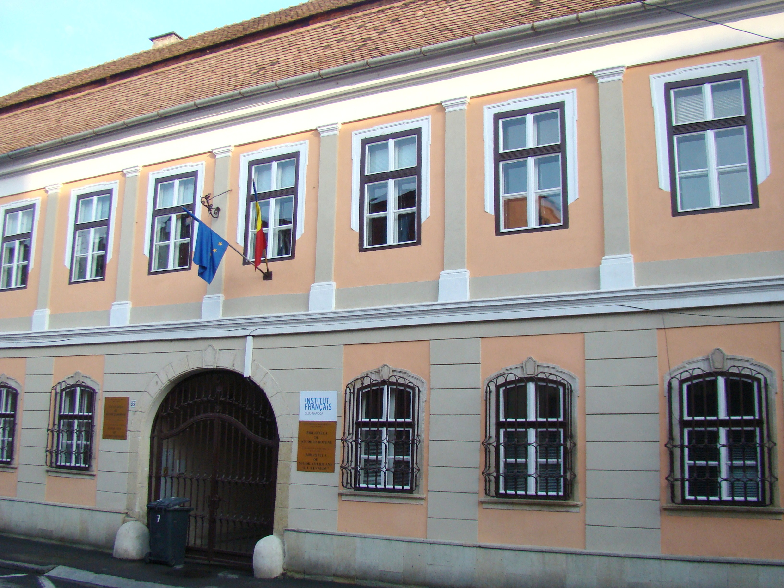 „Casa Beldi”, azi Facultatea de Studii Europene